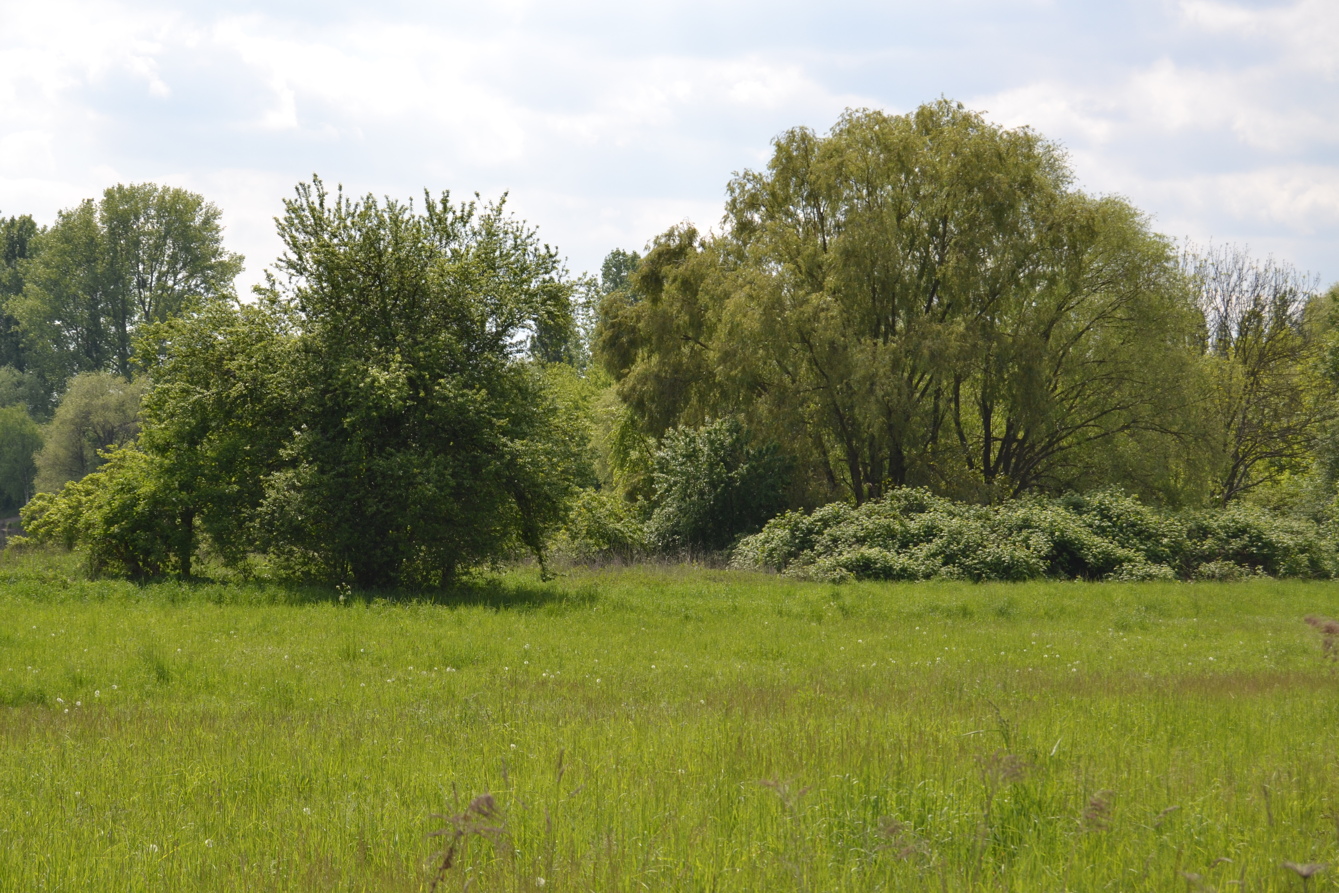 Landschaftsschutzgebiet Kaulsdorfer Seen (Butzer See und Umgebung) in Berlin-Marzahn-Hellersdorf/Kaulsdorf im Mai 2014.